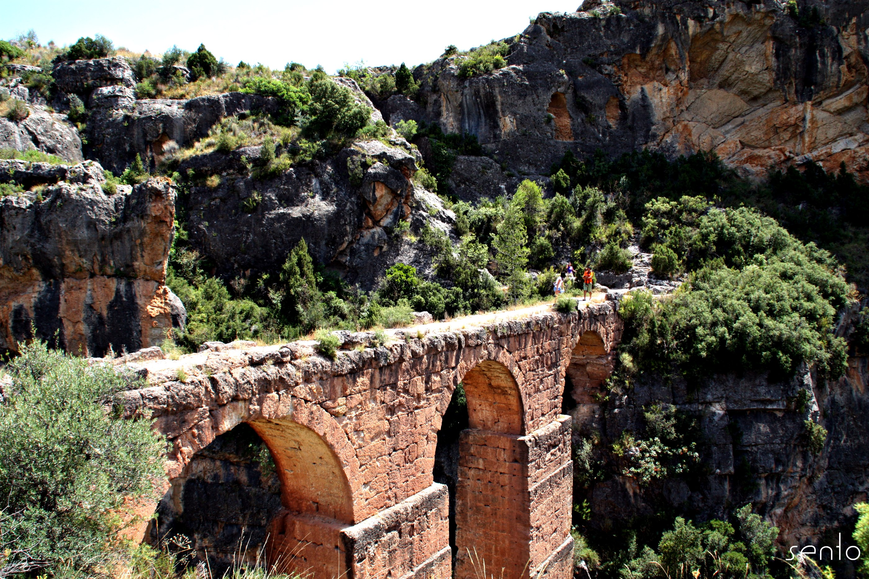 Excursión a Chelva y la Peña Cortada